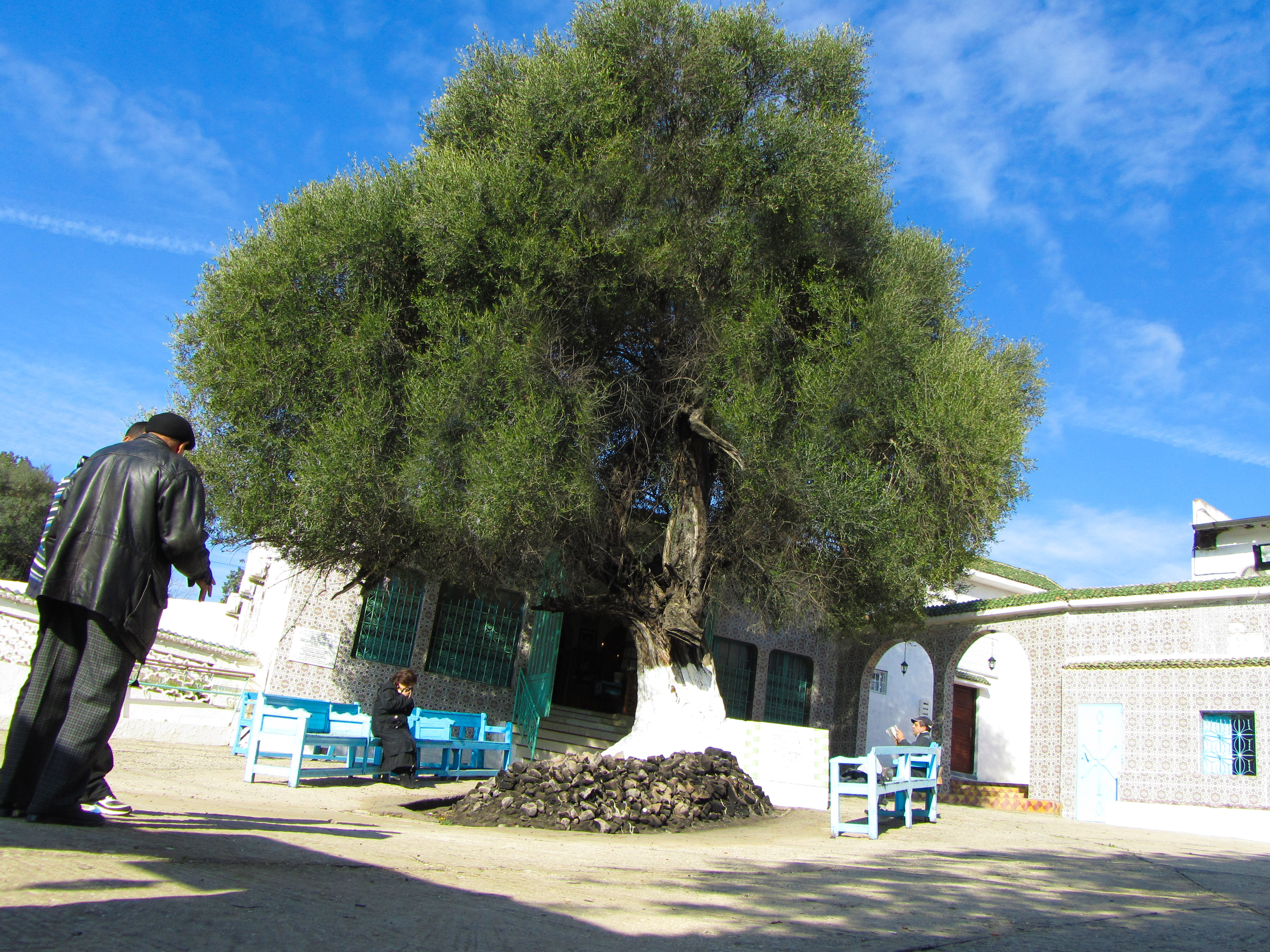 ציון קברו של רבי עמרם בן דיוואן